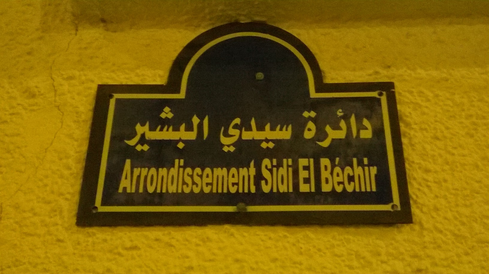 sidi el Bechir, Tunis